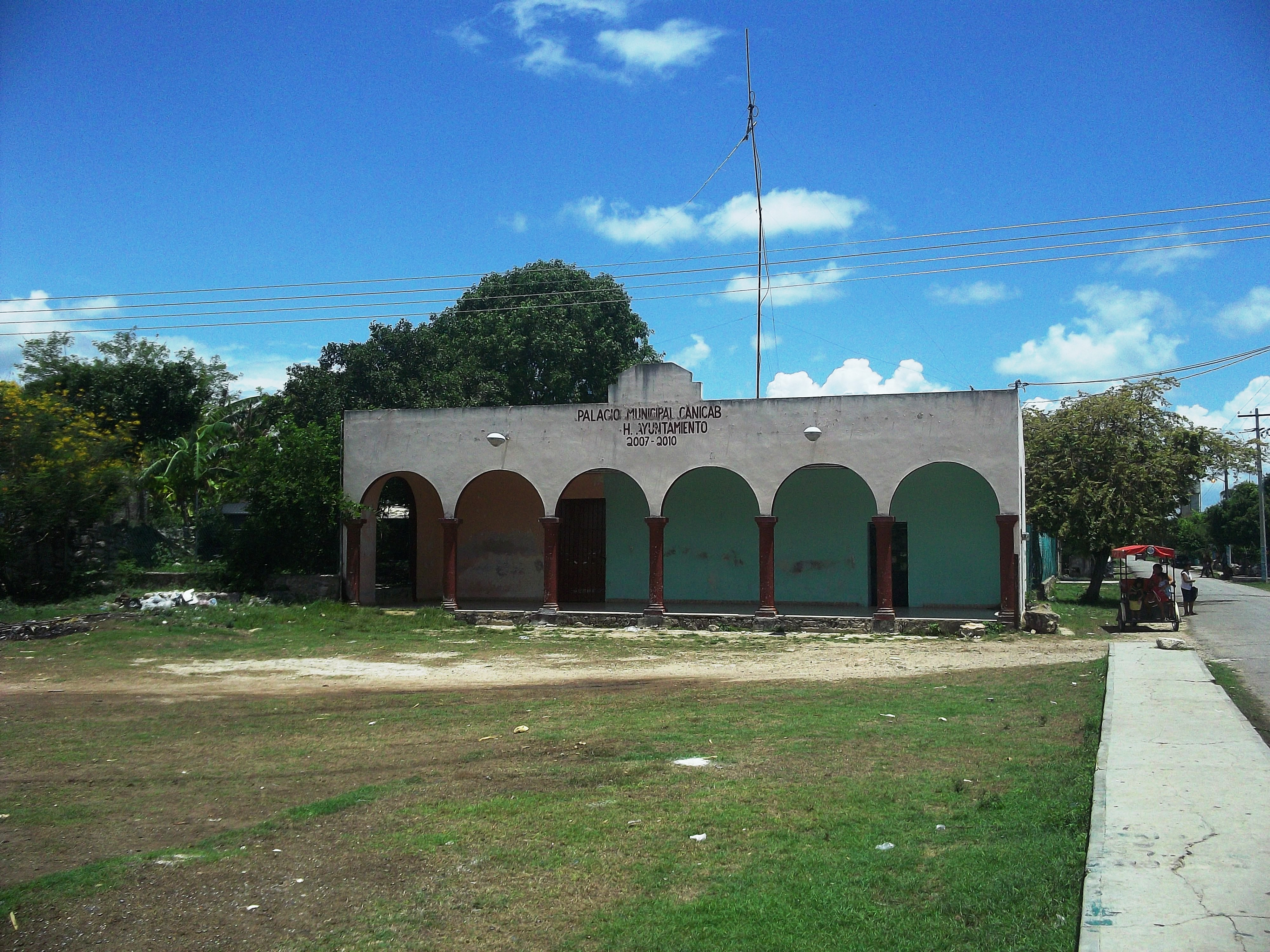 Casa comisarial de Canicab, Yucatán.